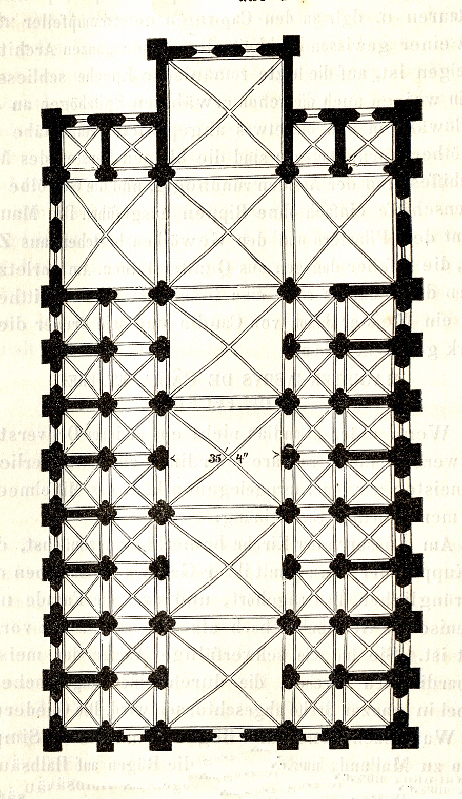 Holzschnitt aus den Mittheilungen der kaiserl. königl. Central-Commission zur Erforschung und Erhaltung der Baudenkmale Band 5, 1860. Beitrag von Wilhelm Lübke mit dem Titel: „Reisenotizen über die mittelalterlichen Kunstwerke in Italien“, 1858/1859, gemeinsam mit Karl Schnaase Druck: k. k. Hof- und Staatsdruckerei Zuordnung der Zeichnungen entsprechend dem Dateinamen